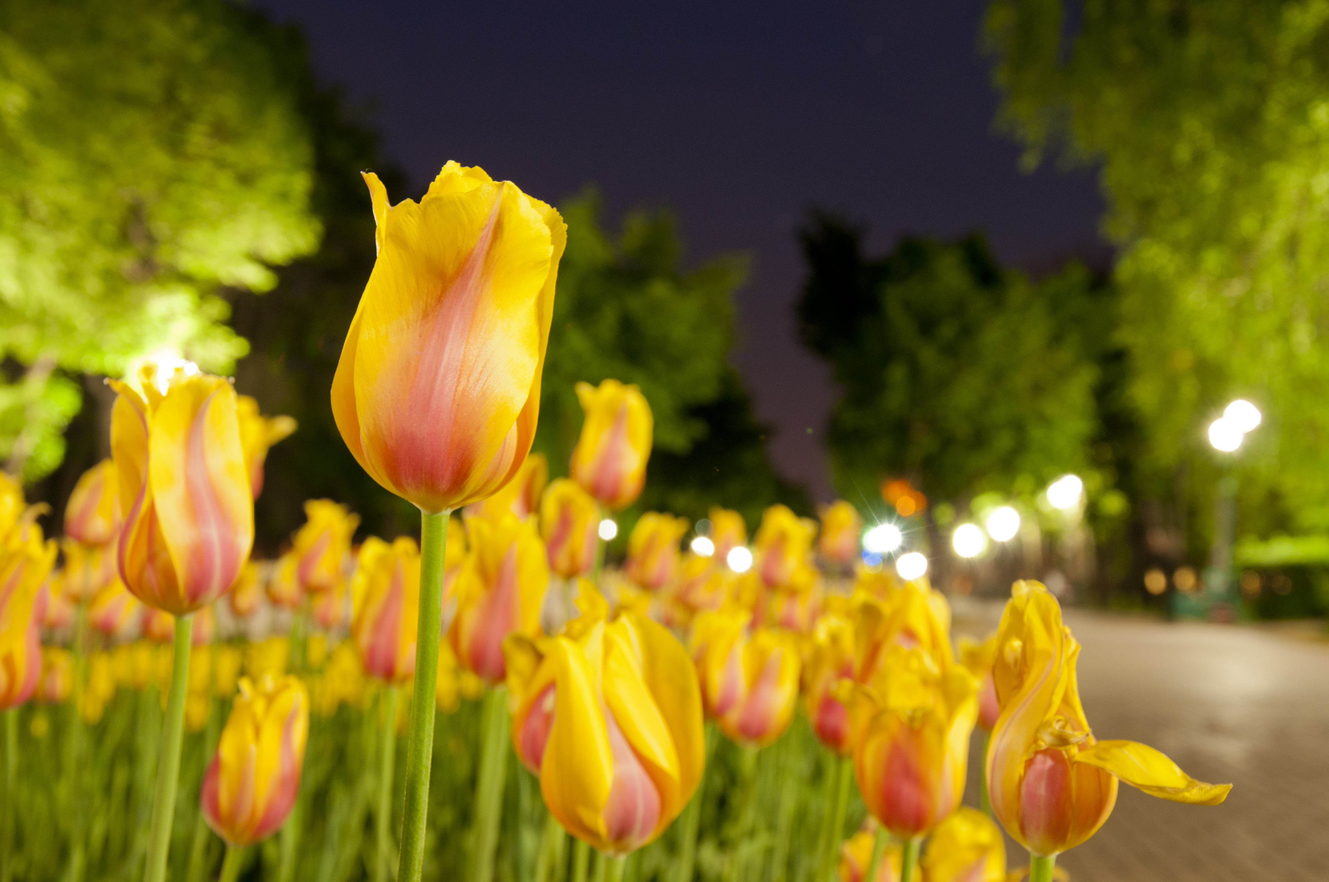 ID:Kir-155 Кіровоград,парк 50-иі річчя Жовтня, ніч